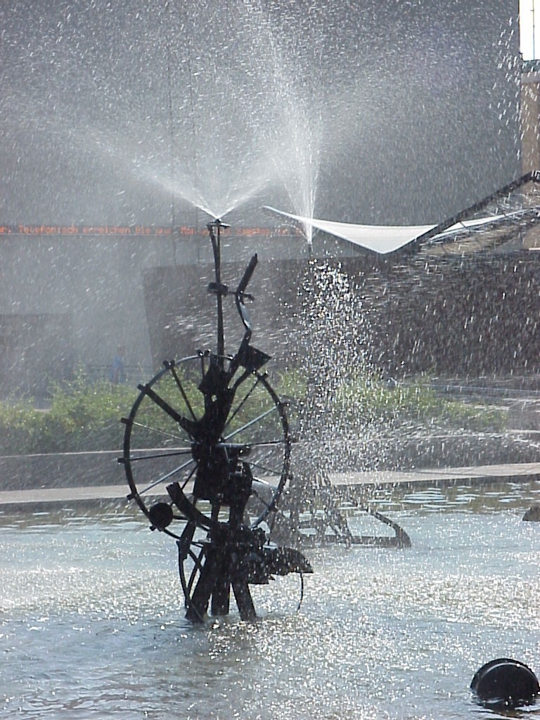 Tinguely-Brunnen in Basel; im Vordergrund eine von 10 Skulpturen; d'Fontääne - die Fontäne